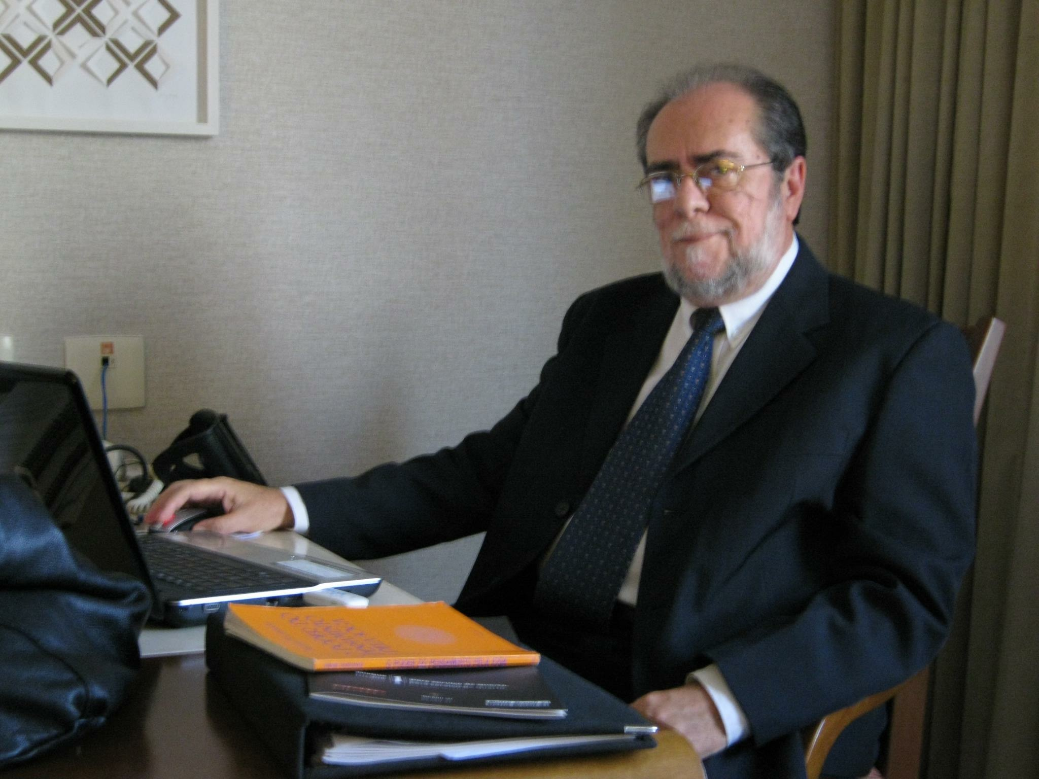 Eustaquio Linhares Borges em Janeiro de 2011